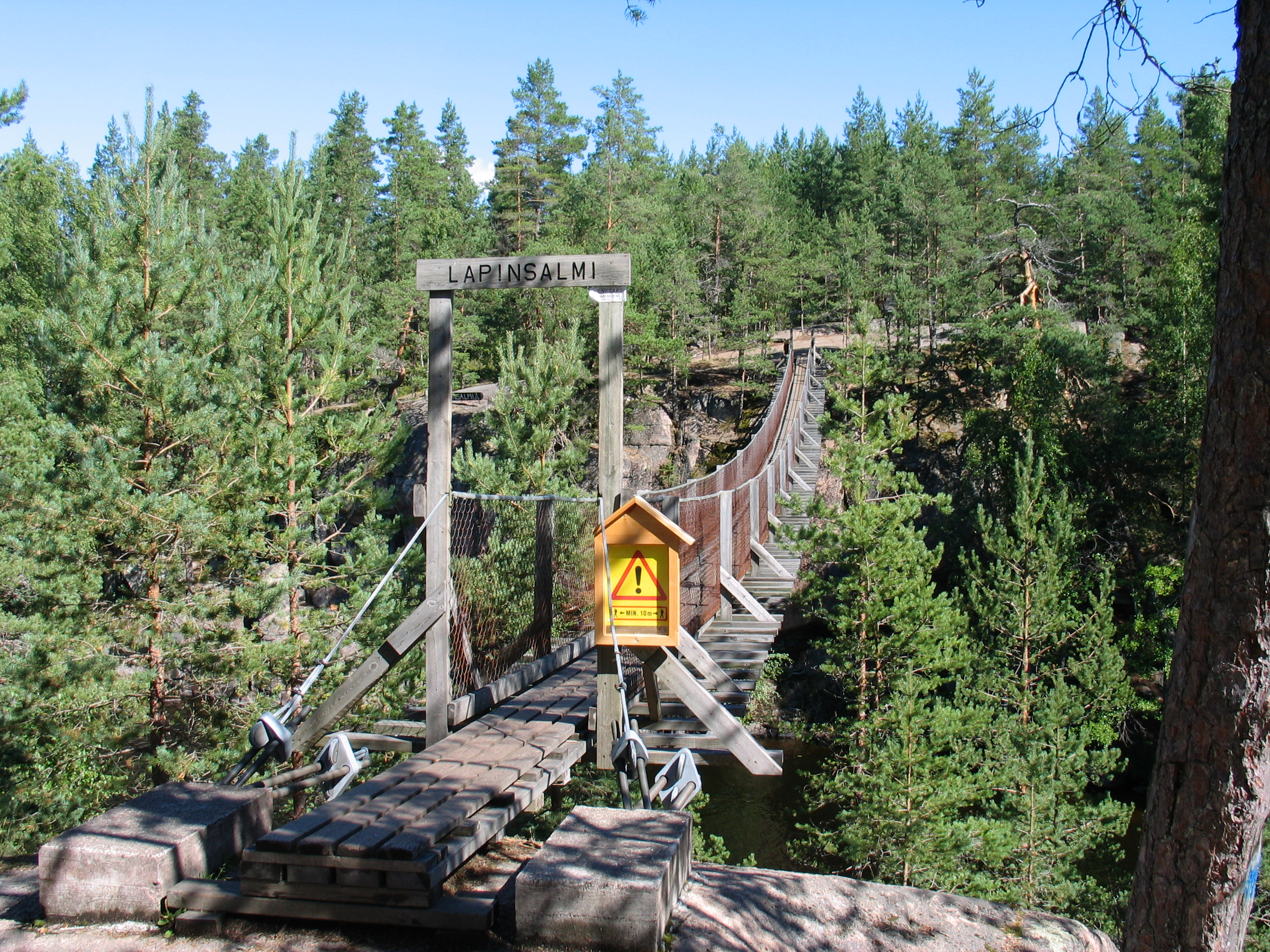 Suspension bridge over Lapinsalmi